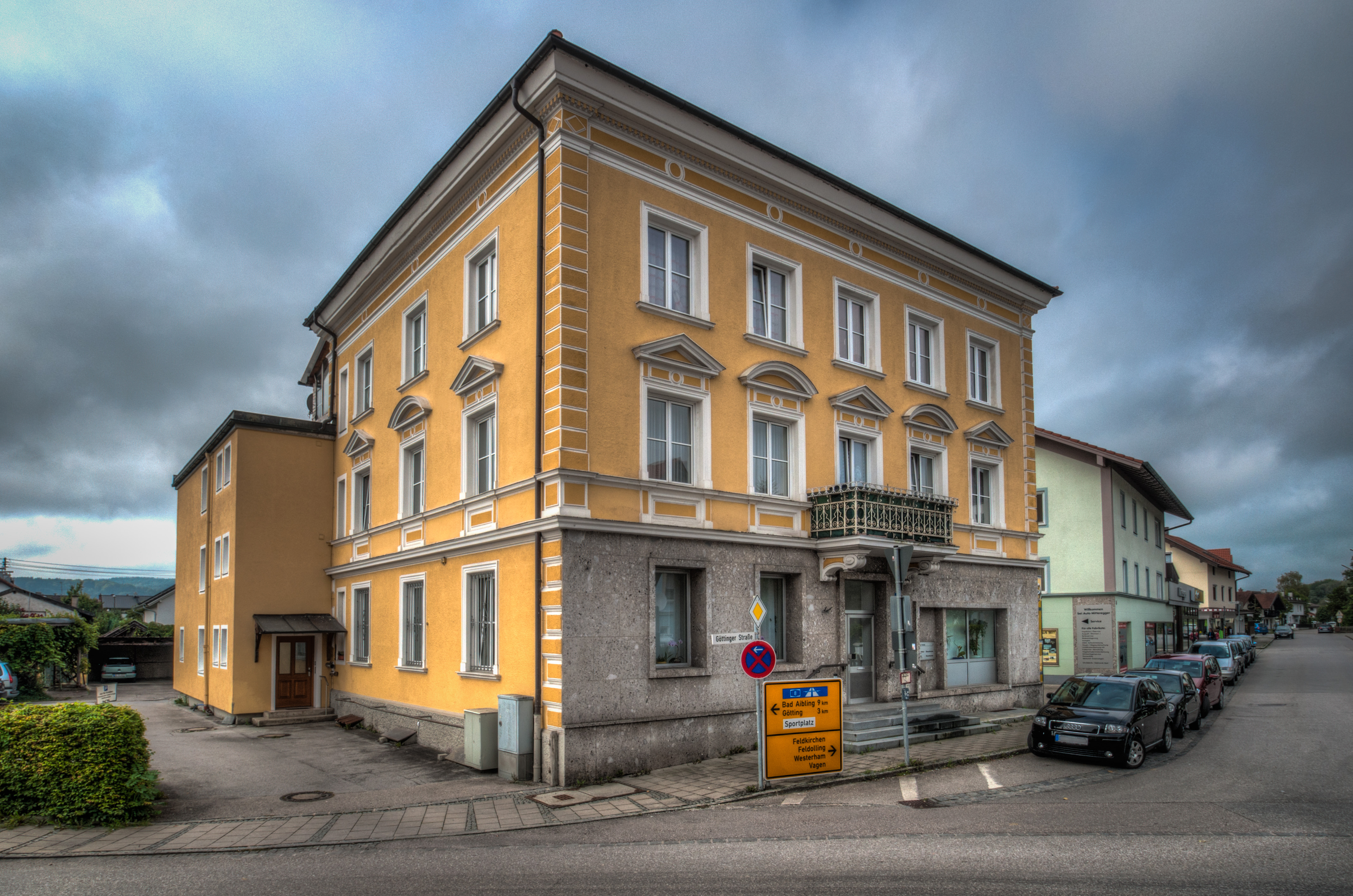 Bruckmühl, Göttingerstraße 2, Wohn- und Geschäftshaus, Neurenaissancegliederung, um 1900.This is a photograph of an architectural monument.